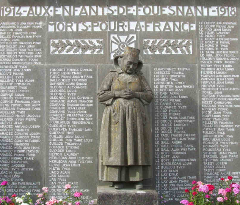 Photo prise par moi-même le 26 mai 2006 Voir aussi Category:War memorials in France